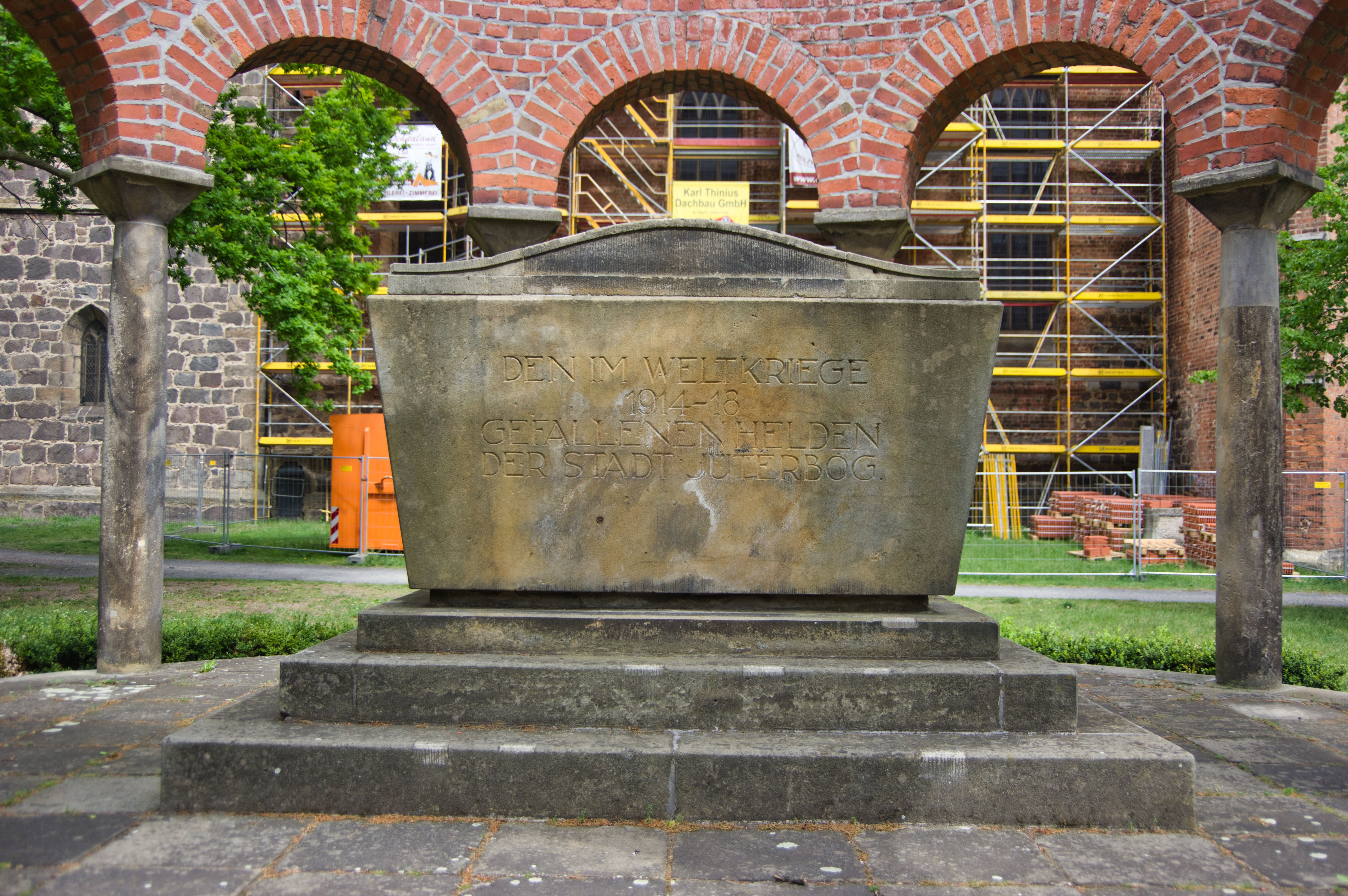 Jüterbog in Brandenburg. Das Kriegerdenkmal befindet sich auf dem Nikolaikirchhof südlich der Nikolaikirche und nördlich der Großen Straße. Das Denkmals steht unter Denkmalschutz.